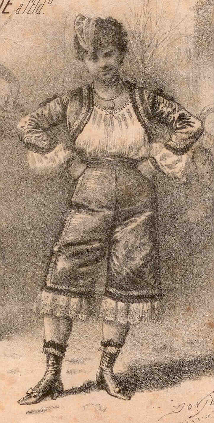 Une carnavaleuse parisienne typique